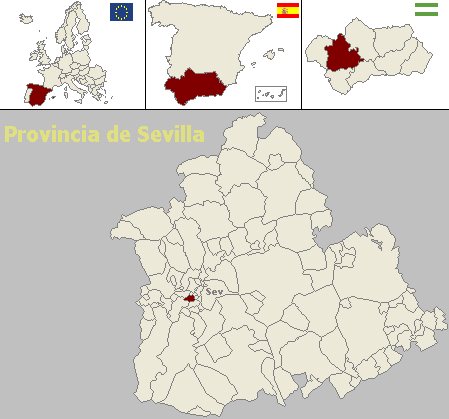 Mapa de localización del municipio sevillano de Bormujos (Andalucía, España)